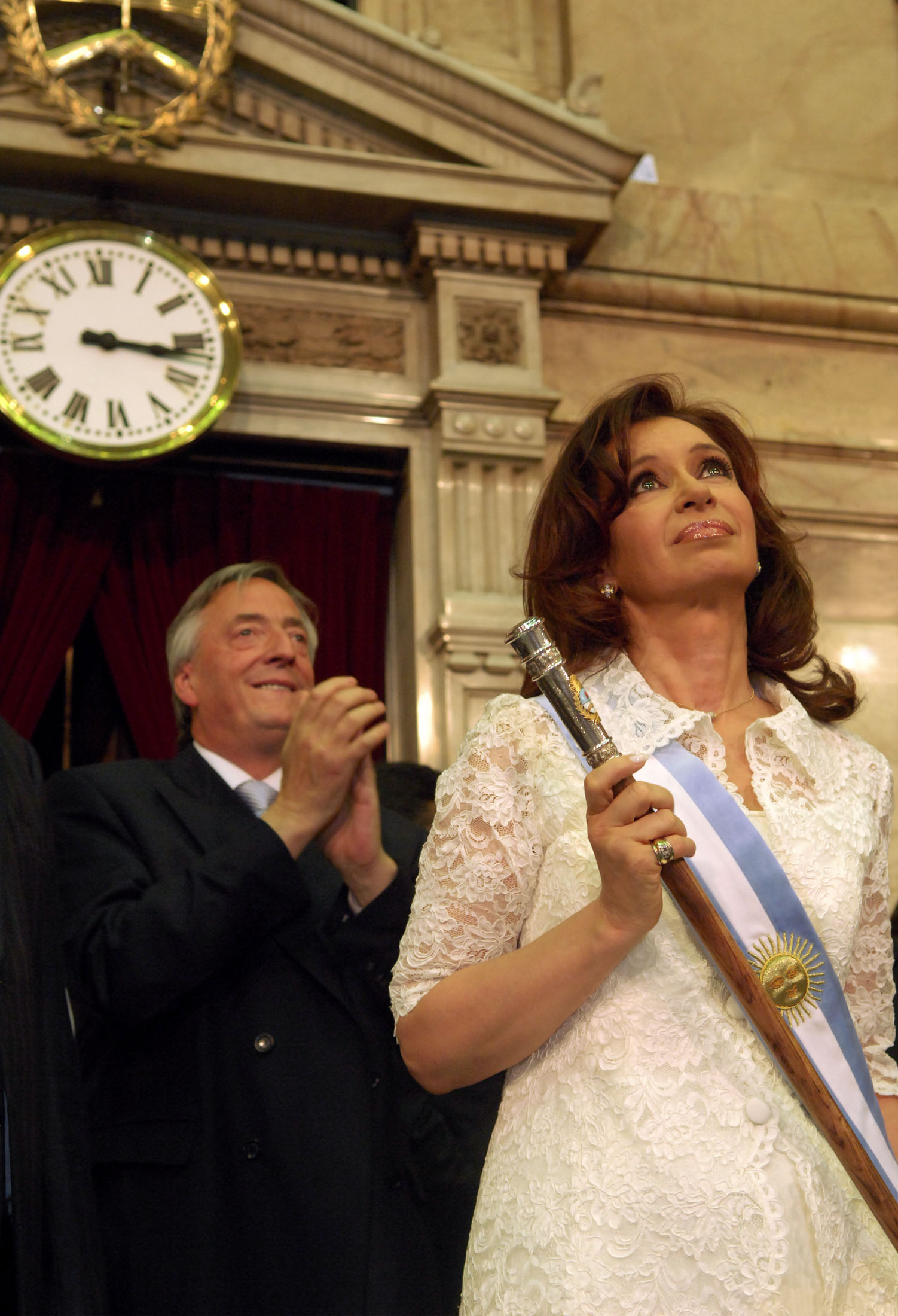 Cristina Fernández de Kirchner con bastón y banda presidencial.